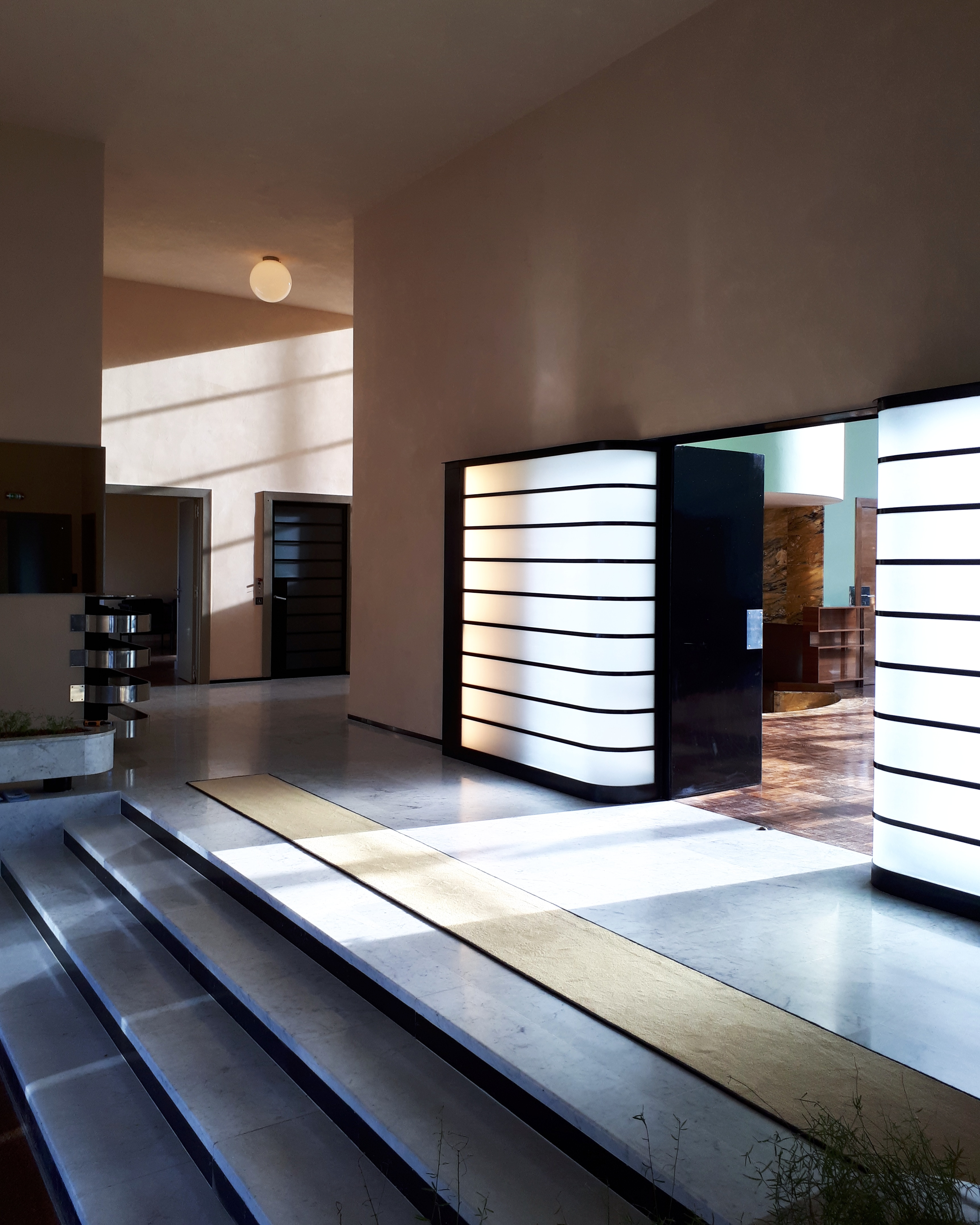 Villa Cavrois: il vestibolo